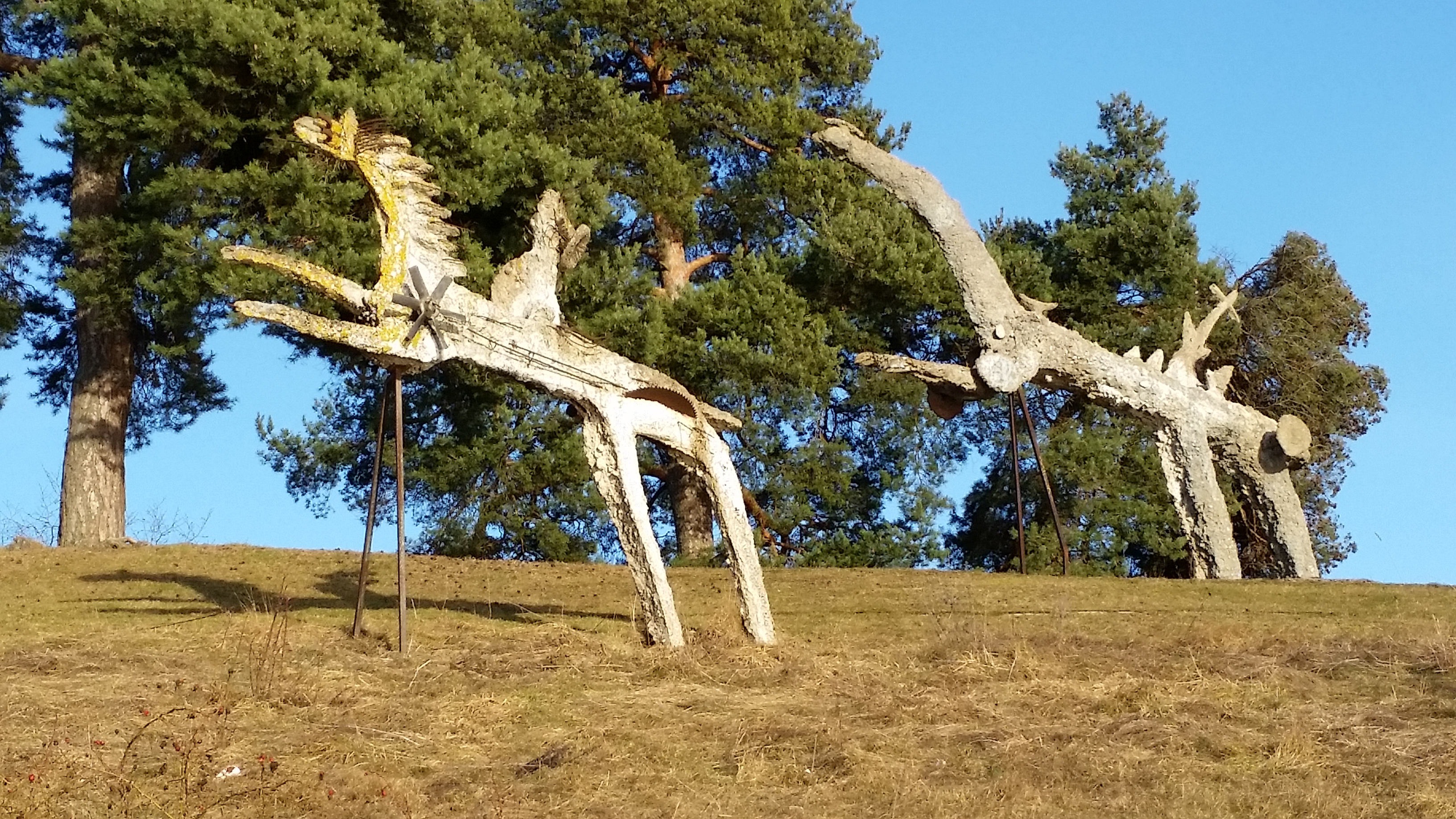 Solspann (1972, 1976) - Władysław Hasior This reproduction of an architectural work or work of art, is covered under the Swedish law of copyright for literary and artistic works (Law 1960:729, paragraph 24), which states that "Work of art may be depicted if it is permanently placed on or at a public place outdoors. Buildings may be freely depicted." See Commons:Freedom of panorama#Sweden for more information.